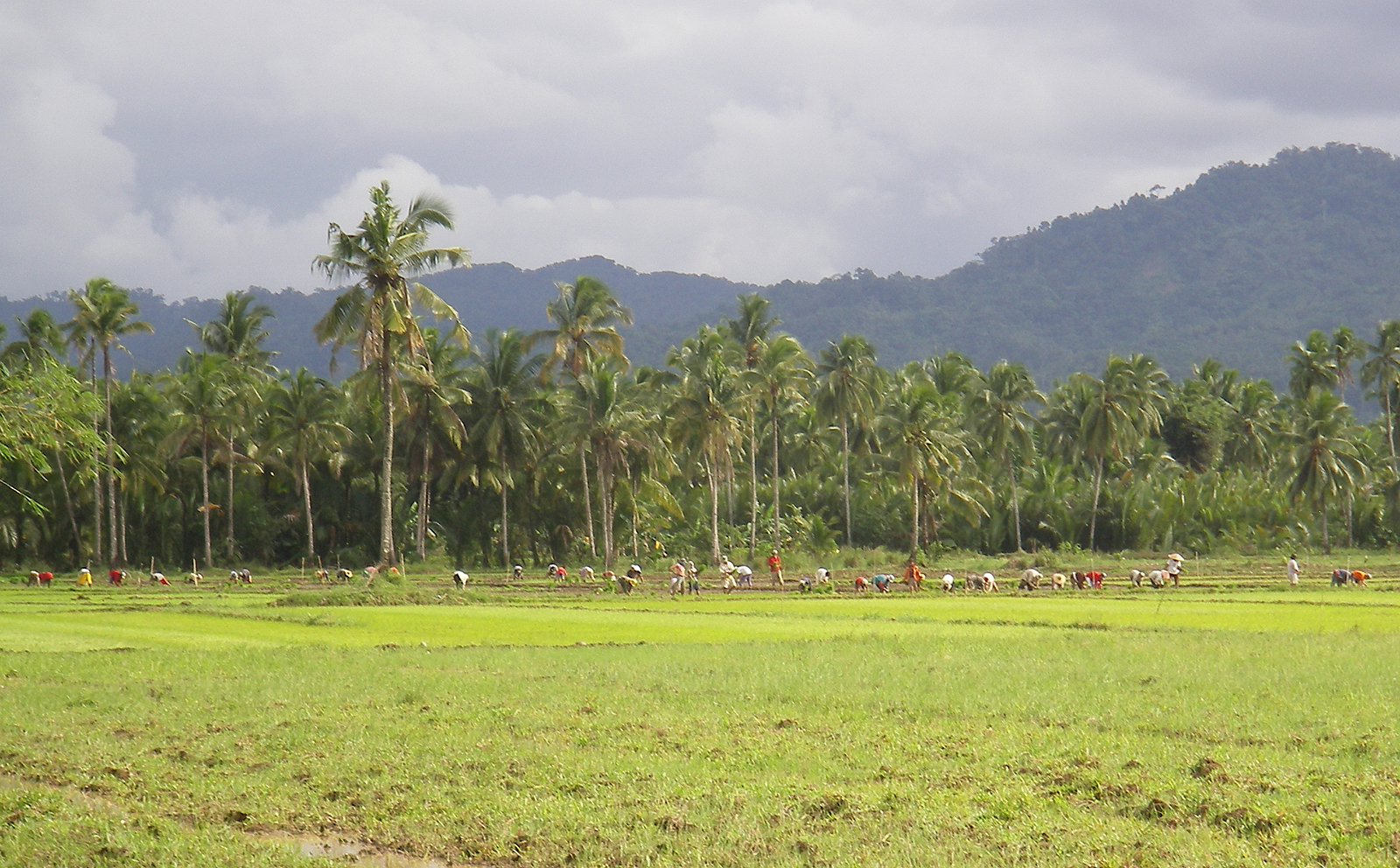 Reis Anbau in Bunga (Lanuza, Mindanao Philippinen)